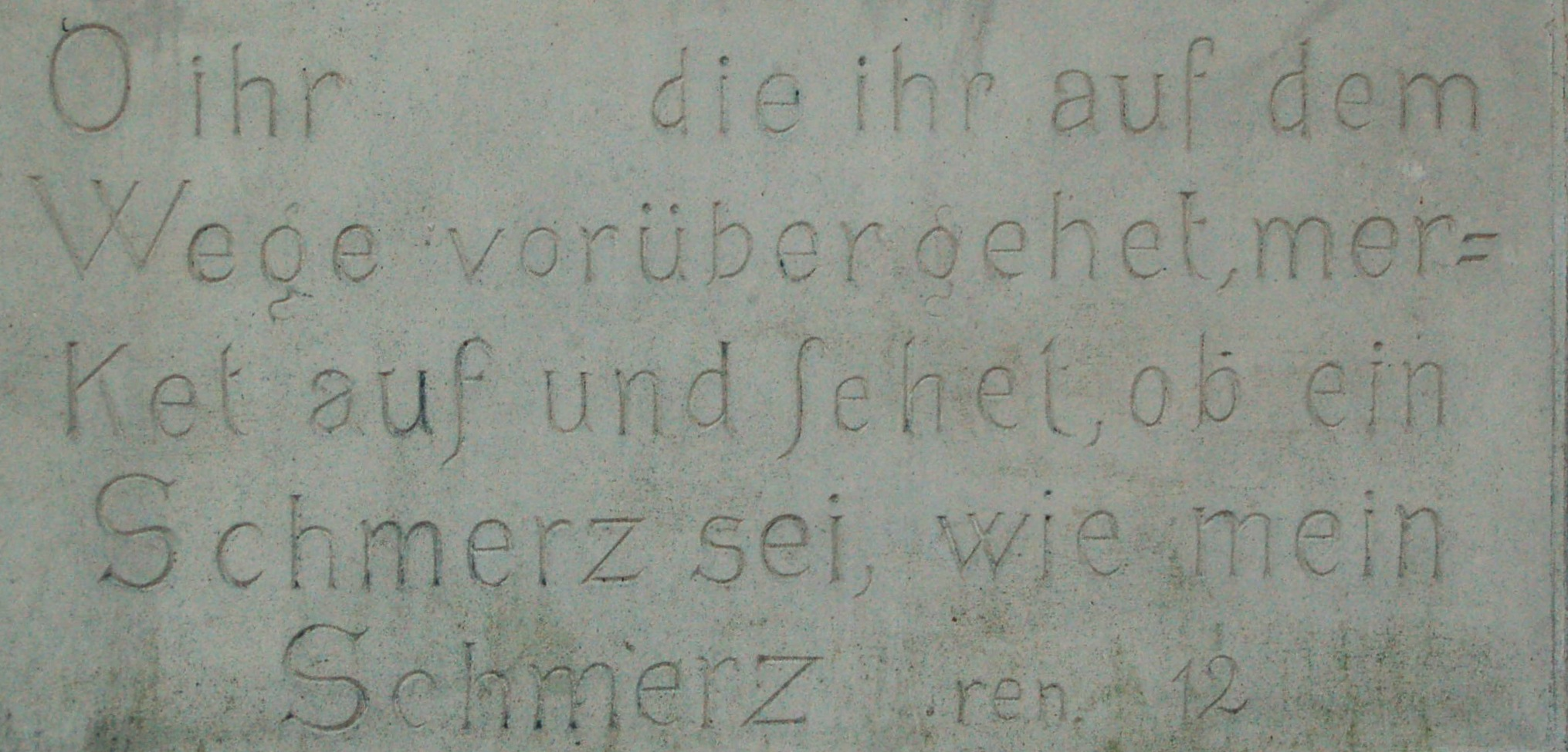 Die Inschrift am "Coesfelder Kreuz" in Münster, Westfalen.